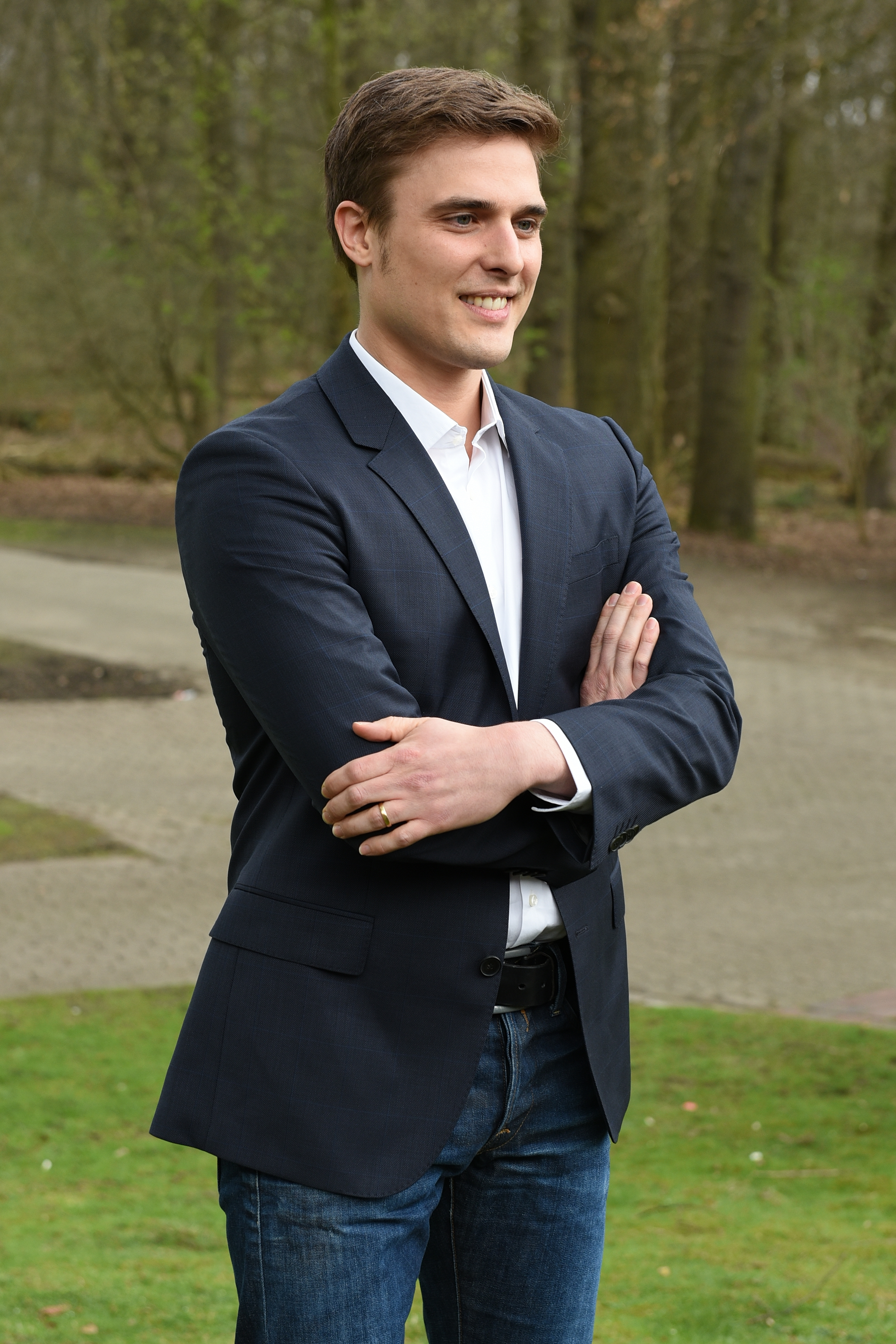 Der deutsche Journalist Constantin Schreiber; aufgenommen im Rahmen der Verleihung des Grimme-Preises 2016.